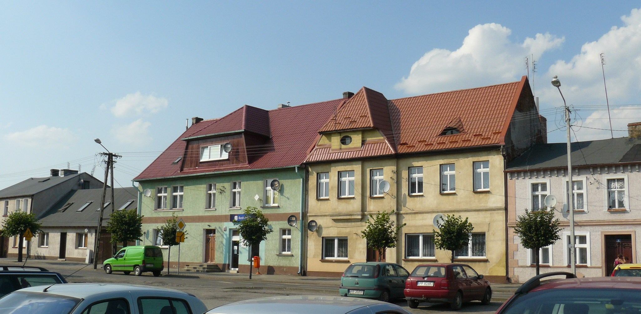 Wysoka.